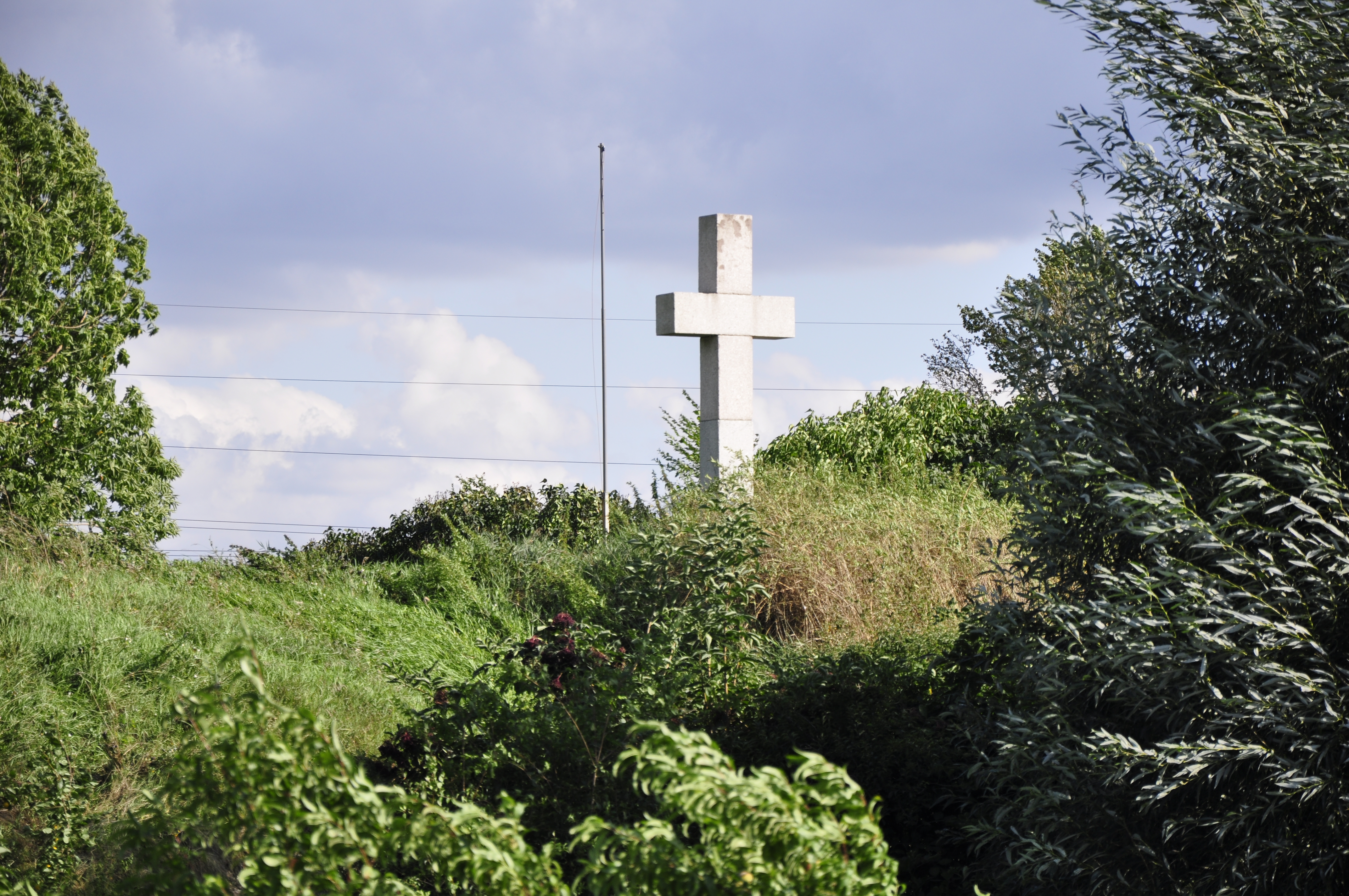 Burg in Lowicz